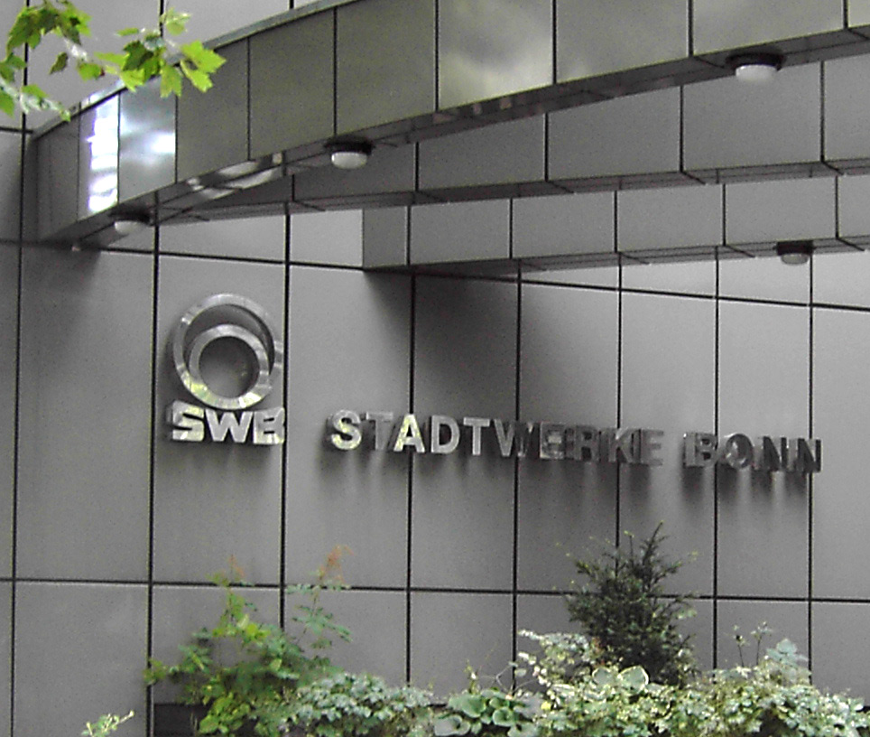 Eingang der Verwaltung der Stadtwerke Bonn.